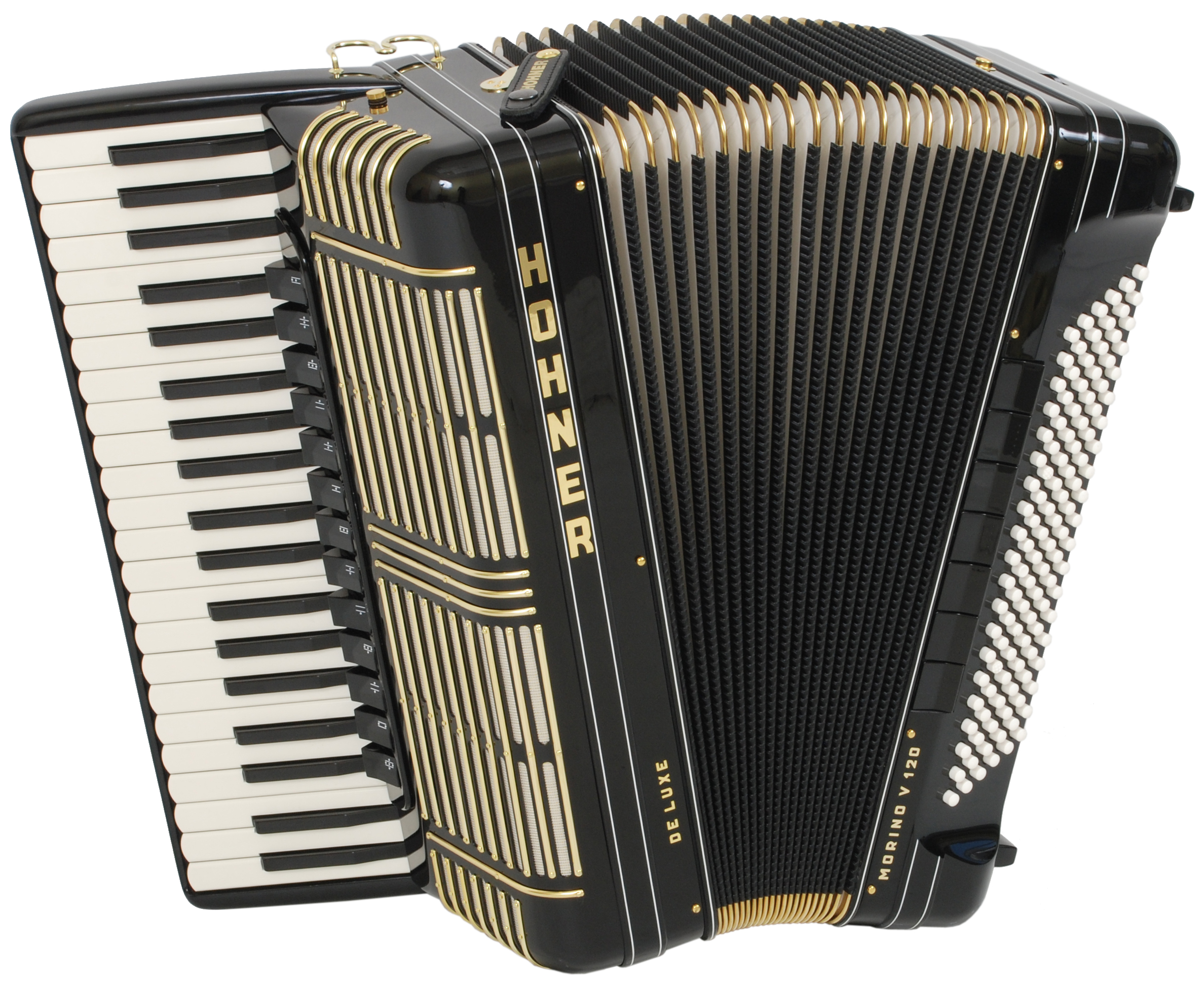 Akordeon Morino V 120 De Luxe firmy Hohner